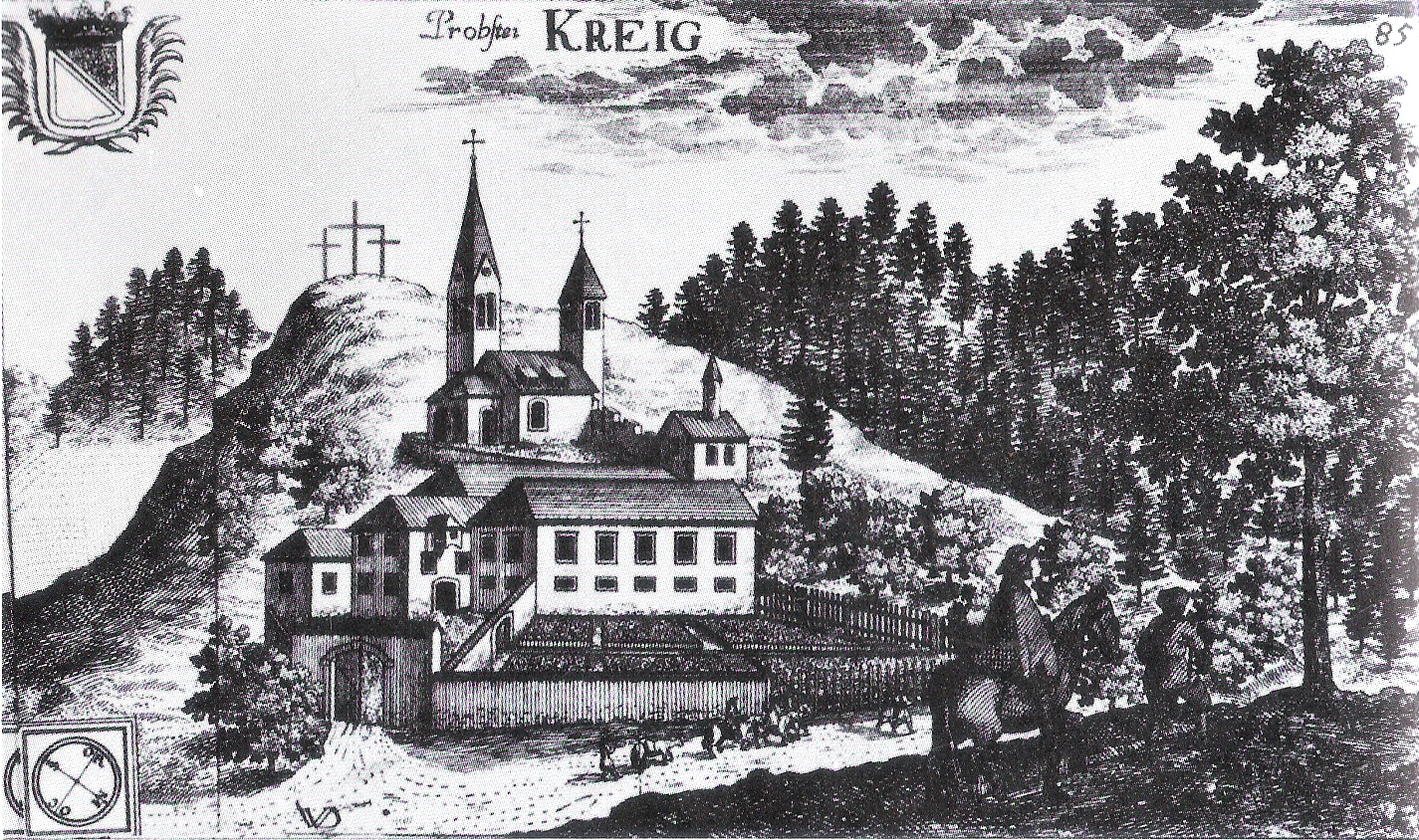 Kirche und Propsteihof in Kraig (heute Gemeinde Frauenstein) in Kärnten in einer Darstellung von Valvasor 1688